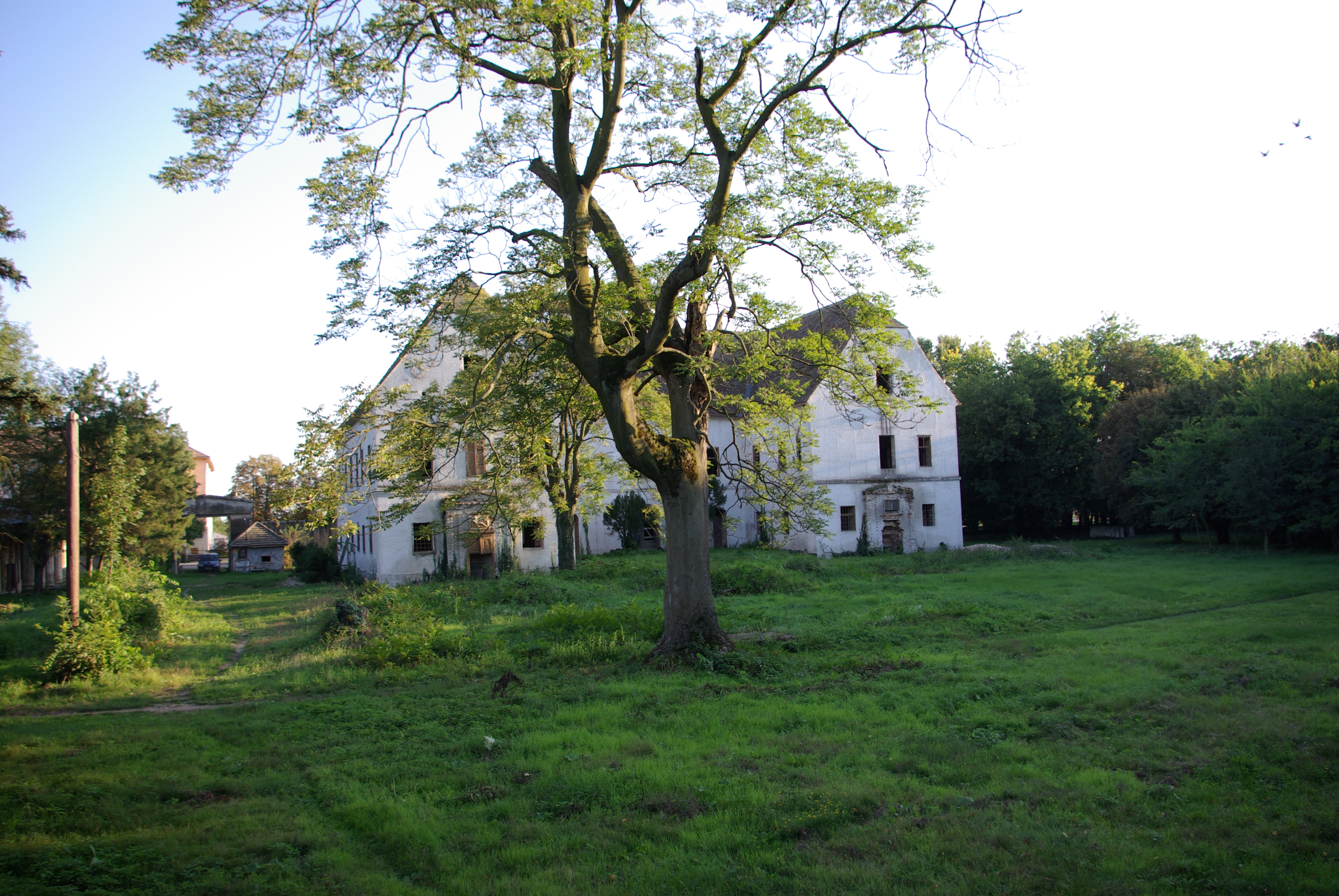 Castelul/Conacul Banloc, 2007 01